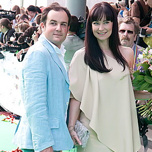 Александр Нестеров с супругой Нонной Гришаевой на церемонии вручения премии МУЗ ТВ 2011 3 июня 2011 года